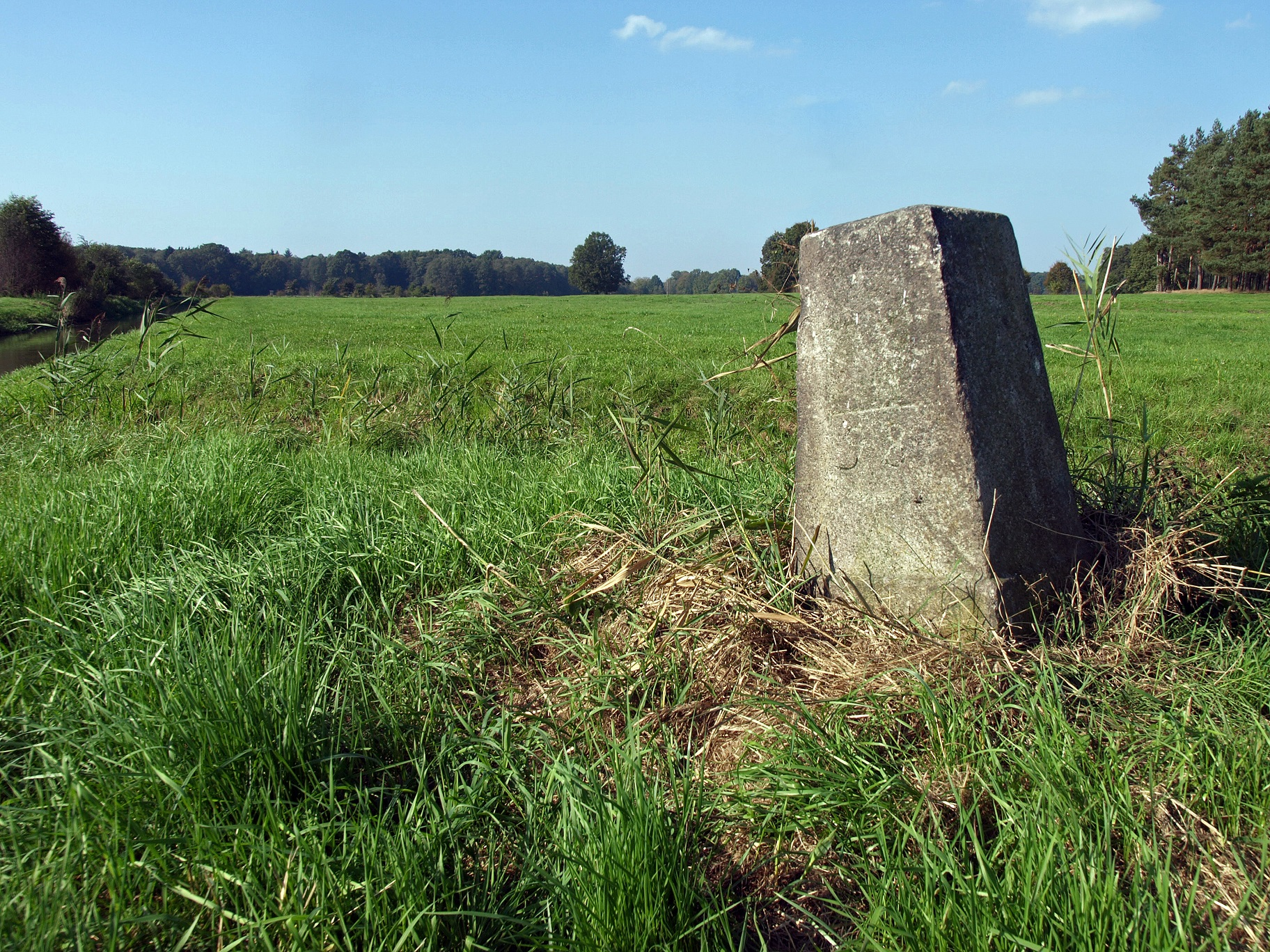 Grenzstein Nr. 98 - Historische Landesgrenze Königreich Sachsen Königreich Preußen 1815 (Wiener Kongress) Hornjoserbsce: Historiski saksko-pruski měznik čo. 98 při Małej Sprjewi mjez Lipičom a Hermanecami, hdźež gmejnske teritorije Radworja, Łaza a Rakec na so trjechja.